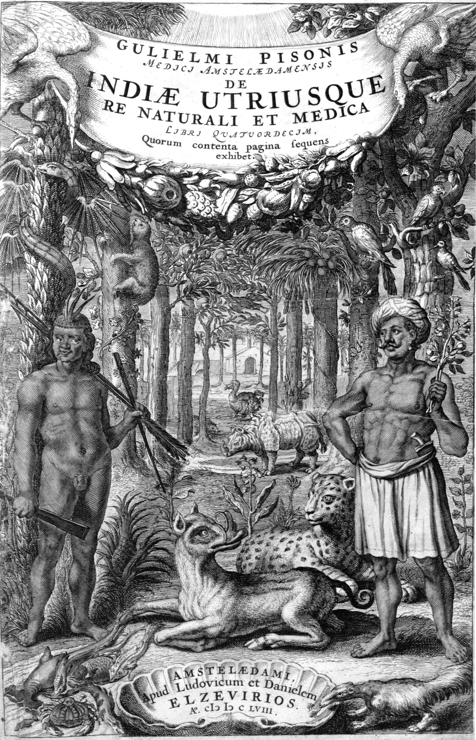 De Indiae utriusque re naturali et medica libri quatuordecim :quorum contenta pagina sequens exhibet